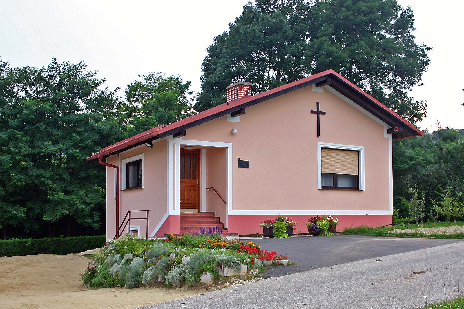 Binkoštna cerkev, Vadarci